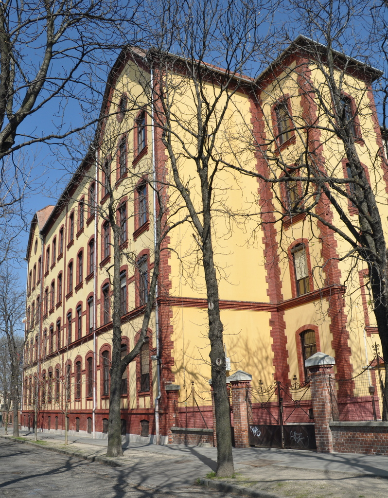 Giorgio Perlasca High School and Secondary School